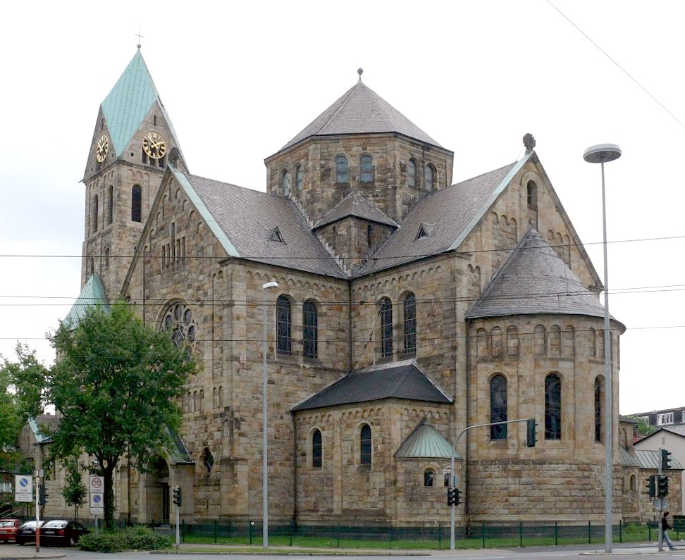 römisch-katholische Kirche St. Georg in Gelsenkirchen, Franz-Bielefeld-Straße; erbaut 1906-1908; unter Denkmalschutz